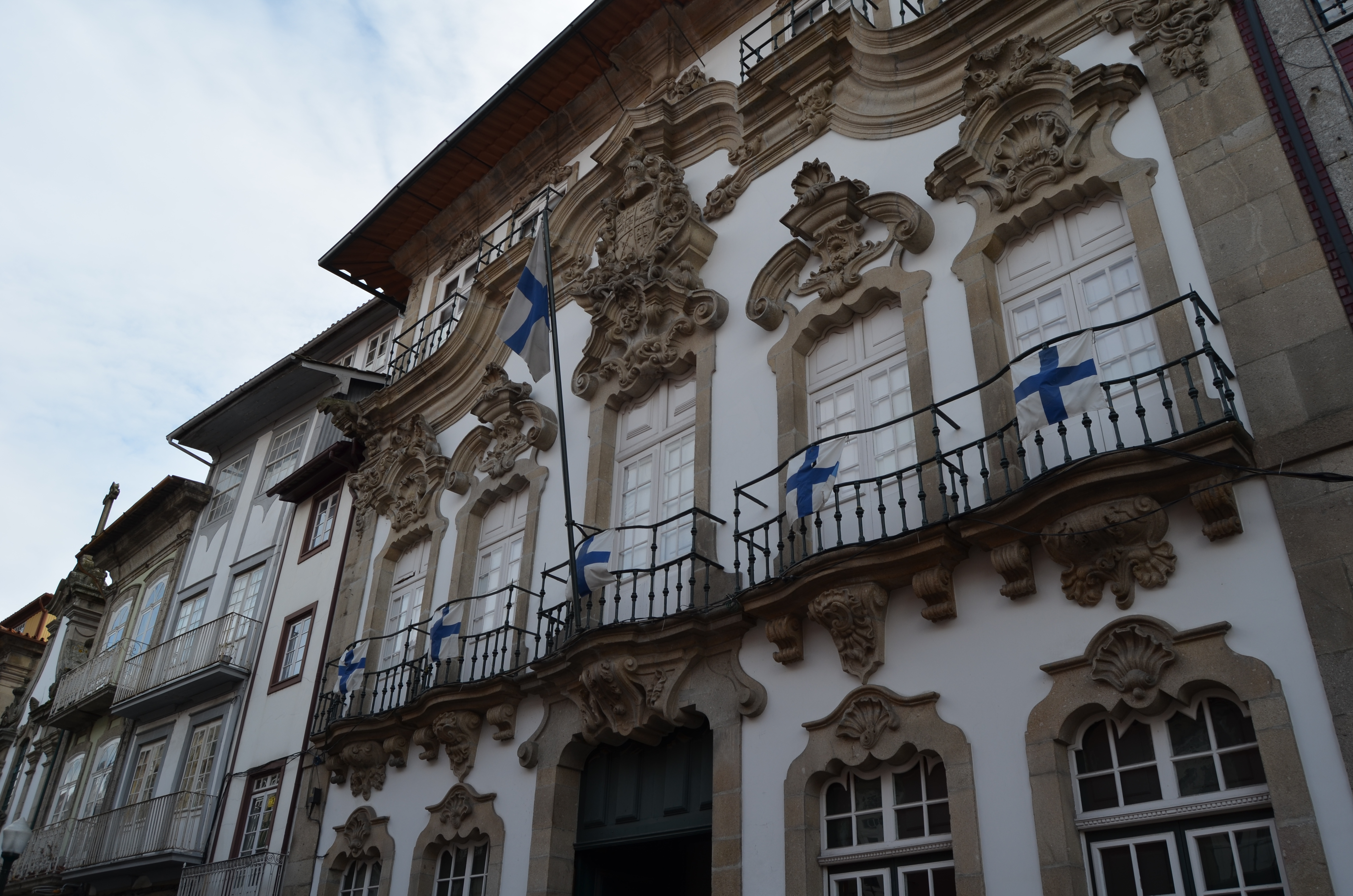 Back to baroque